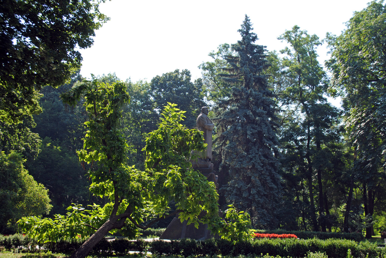 Пам'ятник генералу армії М. Ф. Ватутіну, Київ, Грушевського Михайла вул., Маріїнський парк